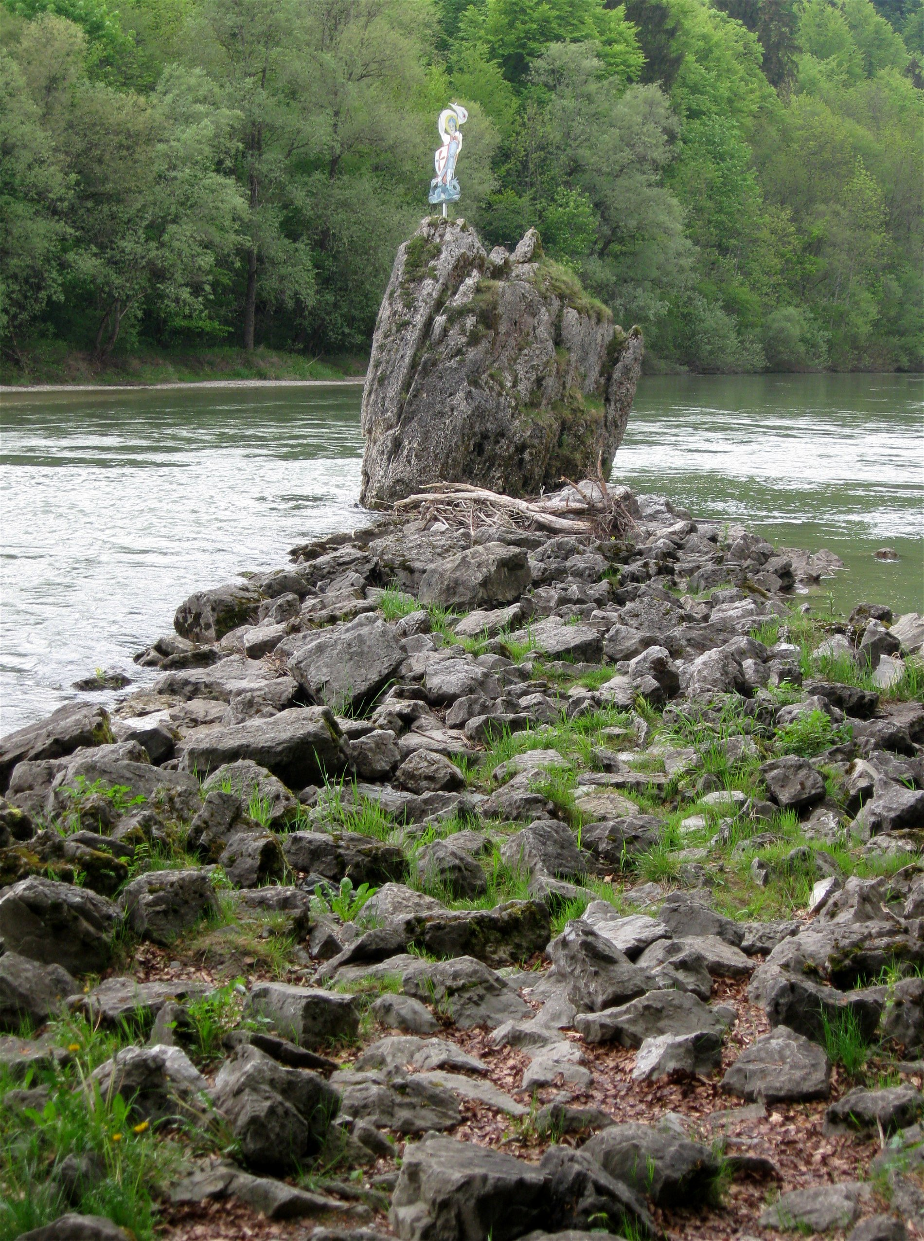 Georgenstein in der Isar bei Baierbrunn, Damm, vom Ostufer aus fotografiert